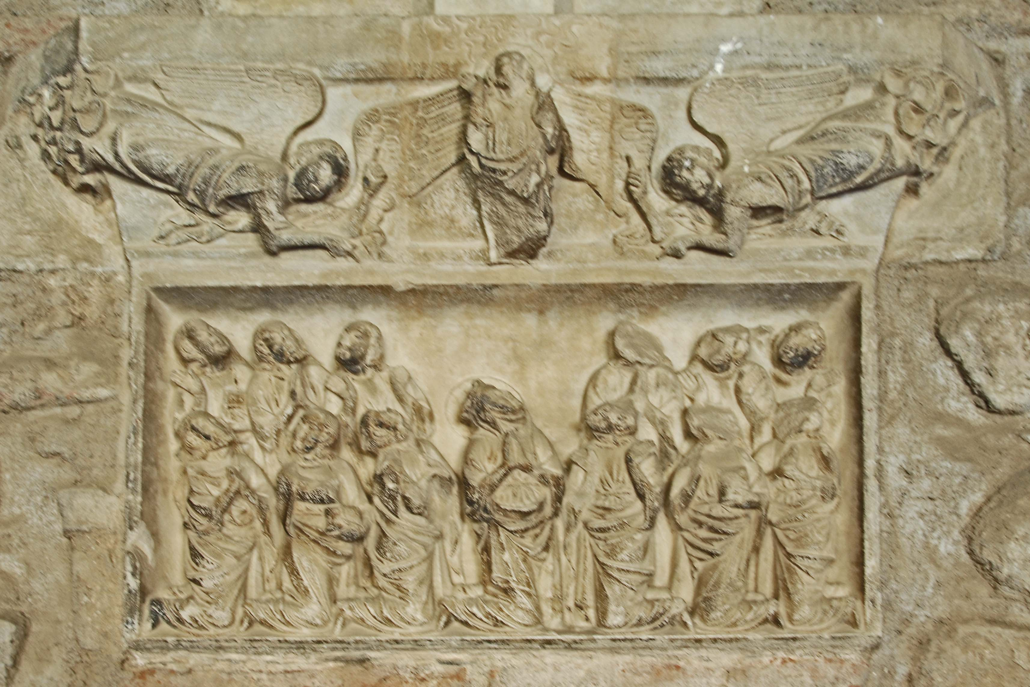 Ste-Eulalie-et-Ste-Julie_d’Elne, Tafel in Südgalerie, Auferstehung Christi